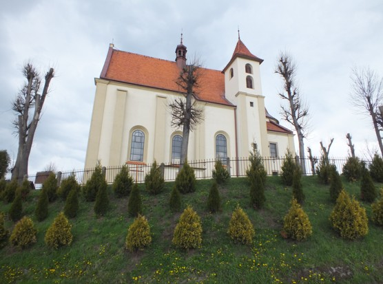 Kościół parafialny pw. Michała Archanioła w Zebrzydowicach